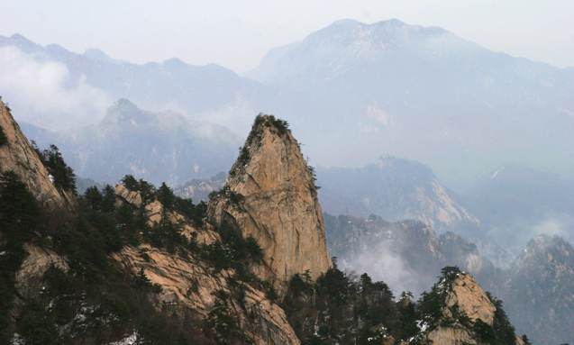 pdsyaoshan